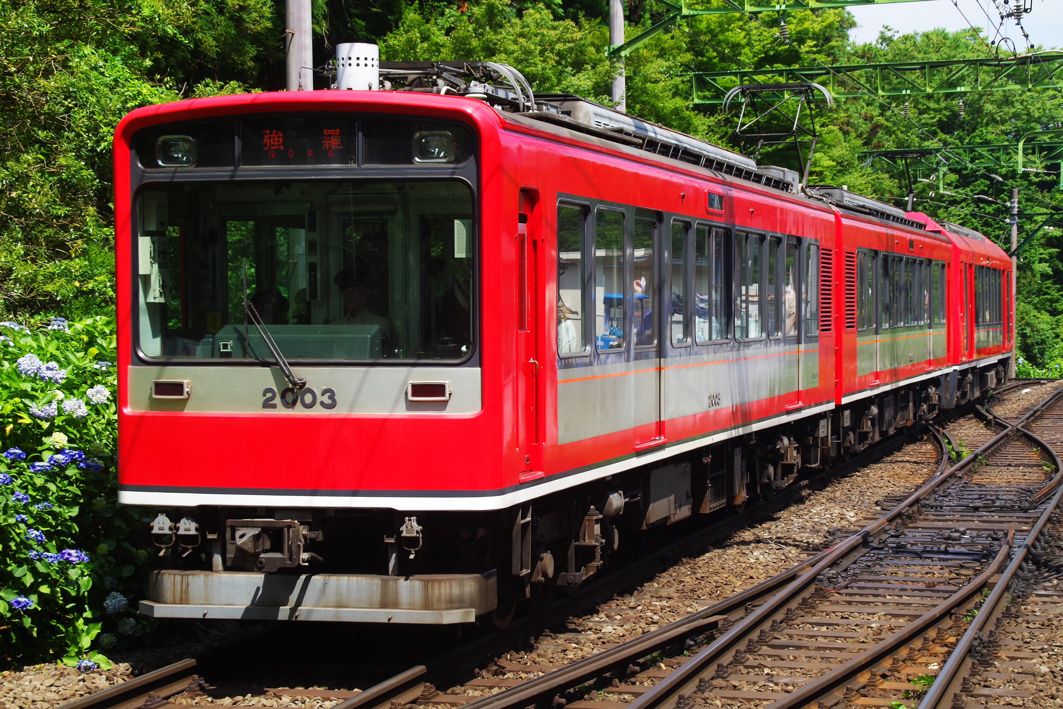 「アレグラ号」と同色に変更された「サン・モリッツ号」第1編成。